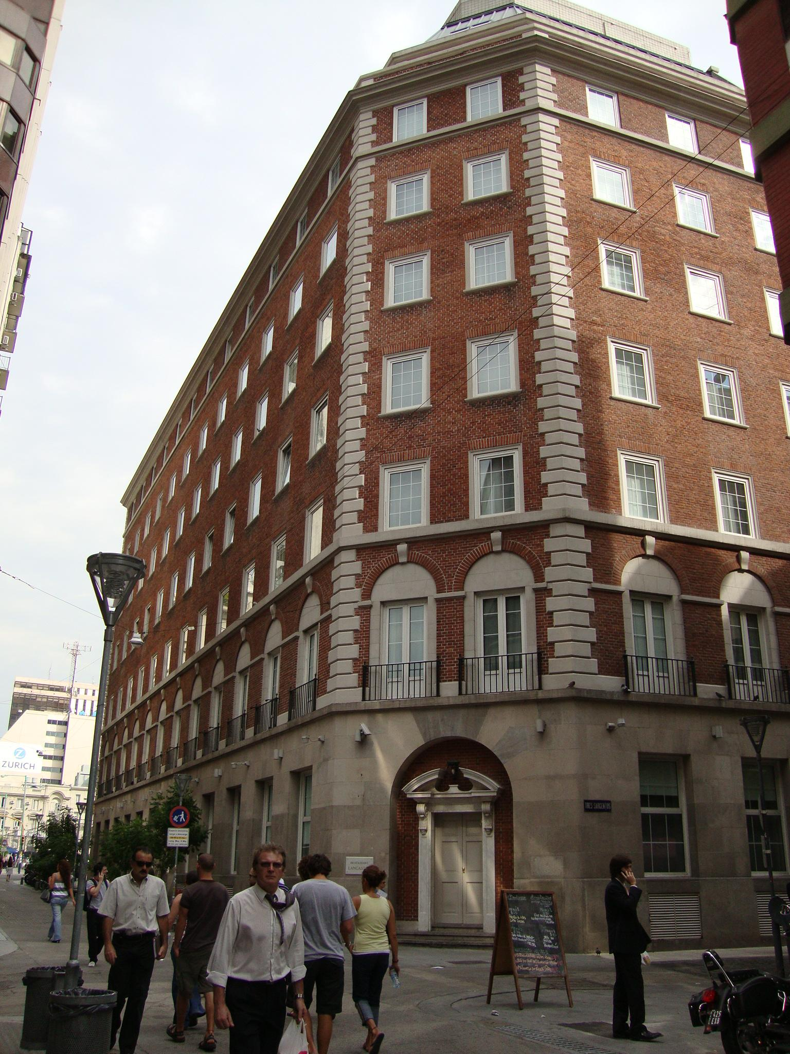 Restaurant "Lancaster", dentro del antiguo Lancaster Hotel, hoy adquirido por la cadena NH Hoteles. Arquitectos: Acevedo, Becú y Moreno Estilo: Georgiano Dirección: Tres Sargentos esq. Reconquista (SO) Año: 1945 Buenos Aires, Argentina.